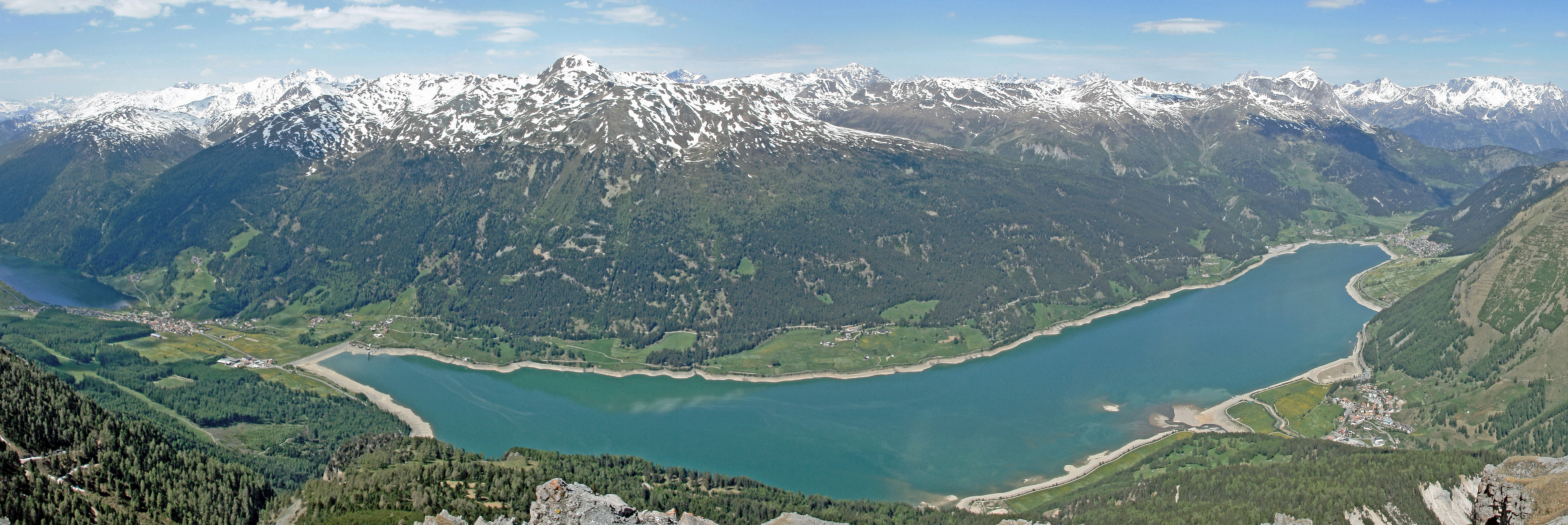 Reschensee-Panorama vom Gipfel des Endkopf's (auch "Jaggl").Ganz links der Haider See.